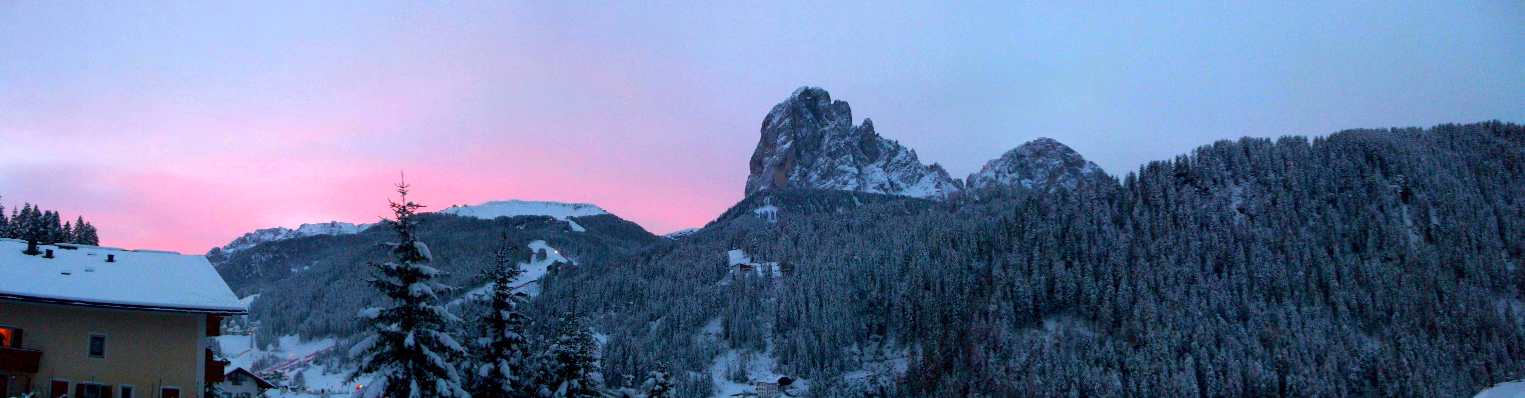 Panorama